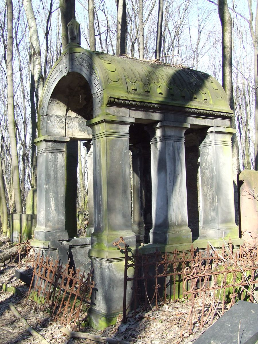 Cmentarz Żydowski na Powązkach, Warszawa, nagrobek